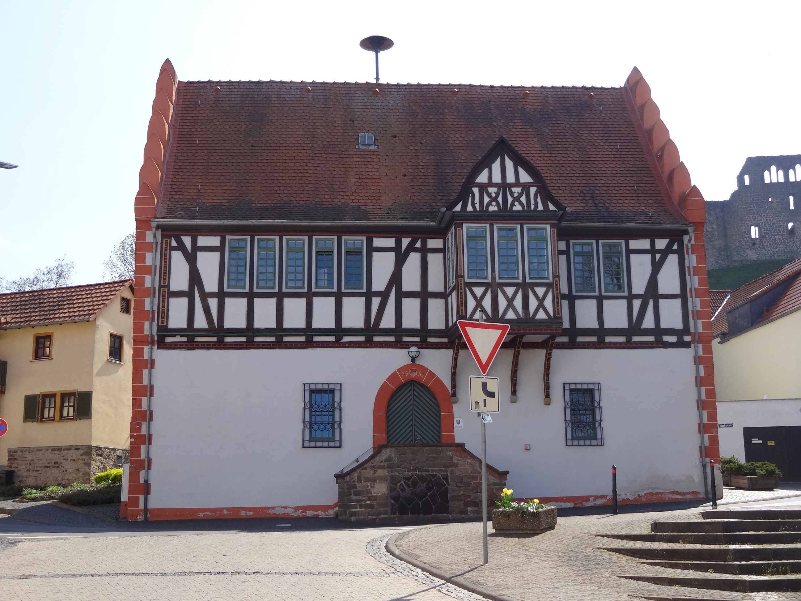 Marktplatz 1 (Münzenberg)